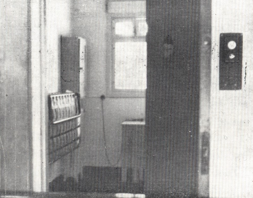 Riihimäen vankilan selli vuonna 1944.